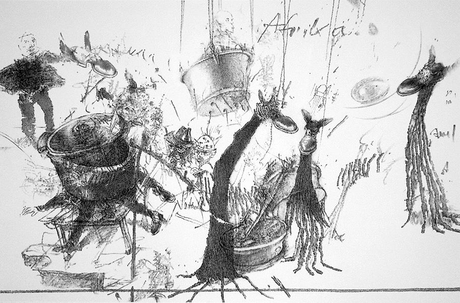 Uwe Ernst: Afrika (Auflösungen), schwarze Kreide auf Papier, 108,5 x 165,5 cm, 2015